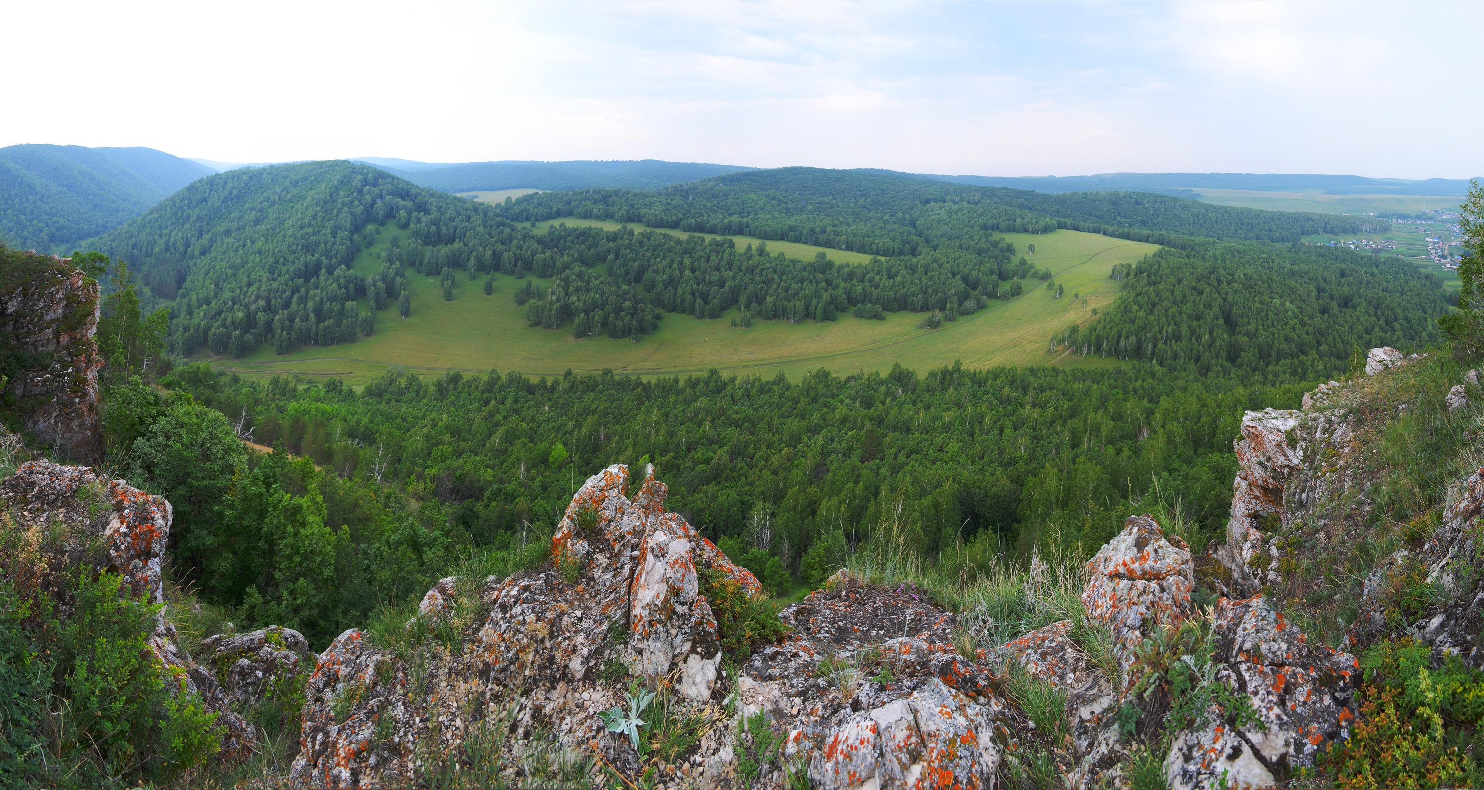 Ландшафт возле д.Гумерово Ишимбайского района